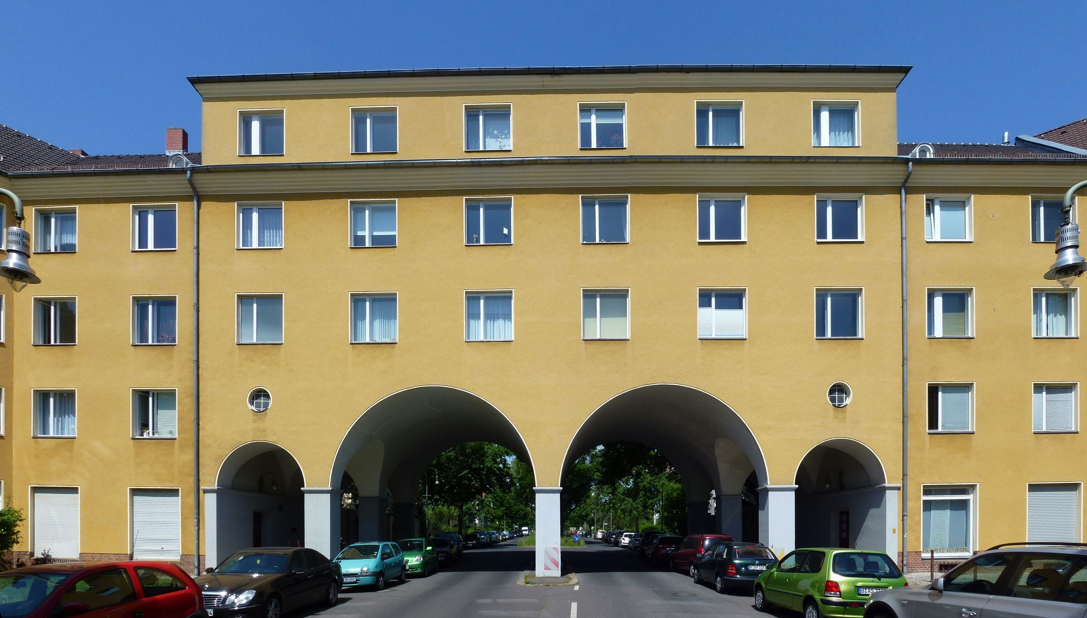 Berlin-Tempelhof Manfred-von-Richthofen-Straße Eingang